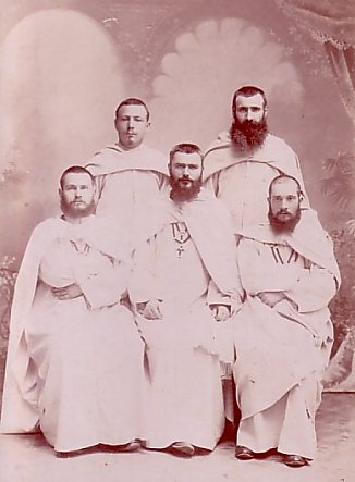 Départ le 25 octobre 1897 de Marseille pour le Soudan français (actuel Mali) des missionnaires Pères blancs. Debout de g. à dr. Frère Jules et Frère Gonzague. Assis les PP. Piery, Augustin Hacquard (futur vicaire apostolique) et Garlentezec.